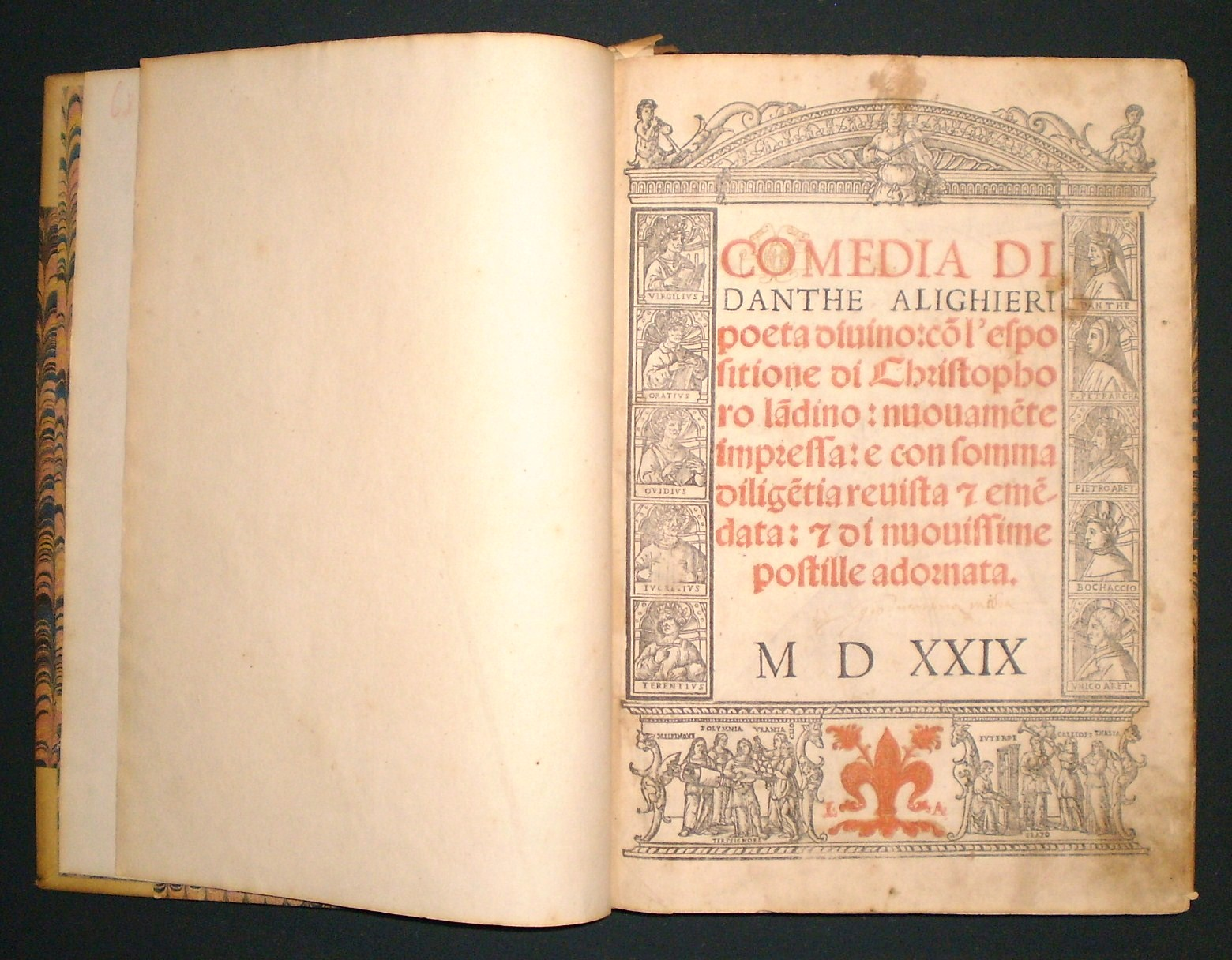 Divina Commedia del 1529, stampata probabilmente a Firenze. Dall'archivio della libreria antiquaria Bourlot di Marco Birocco, Torino